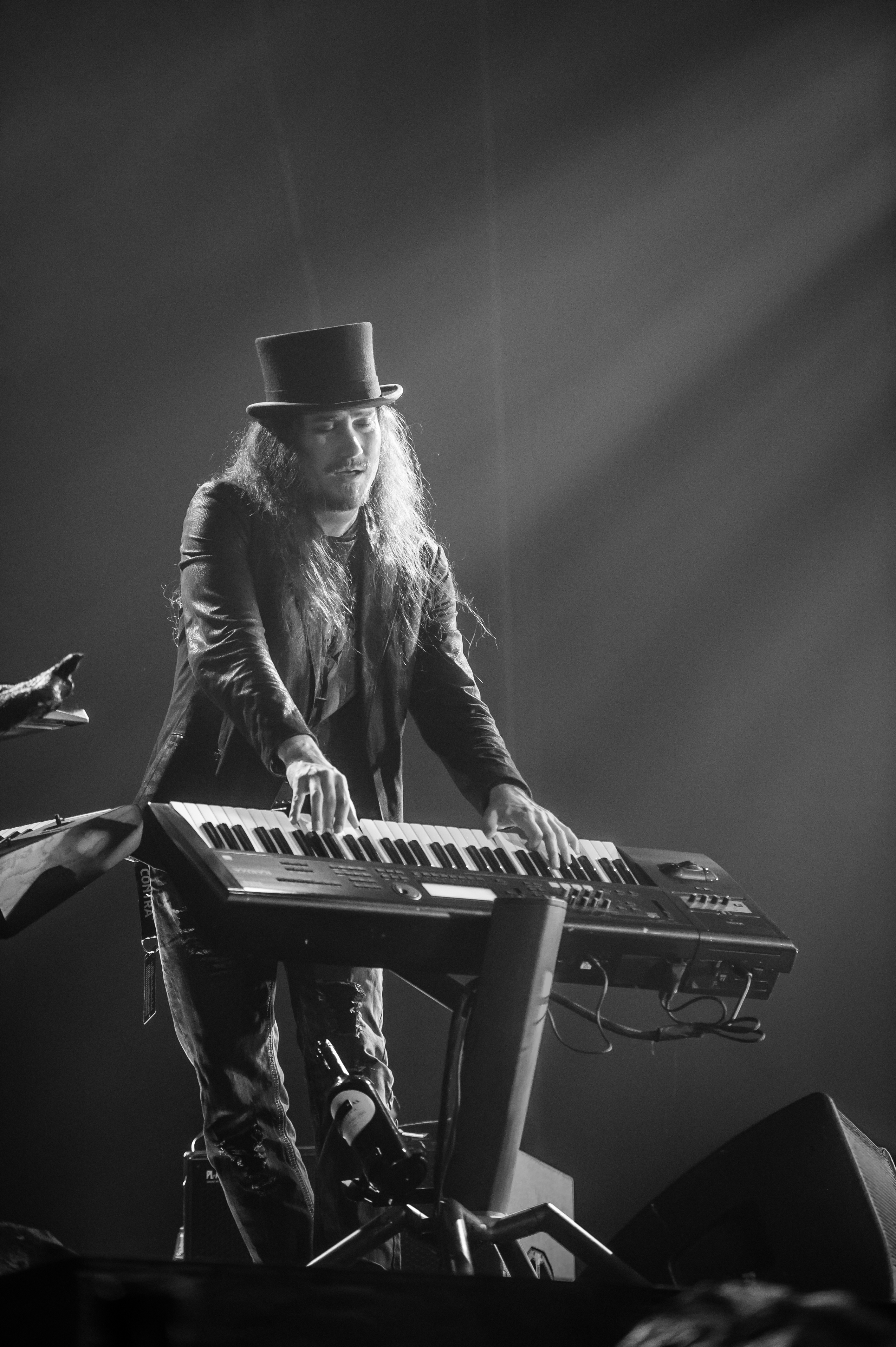 'Nightwish Endless forms most beautiful Tour 2015 Oberhausen'